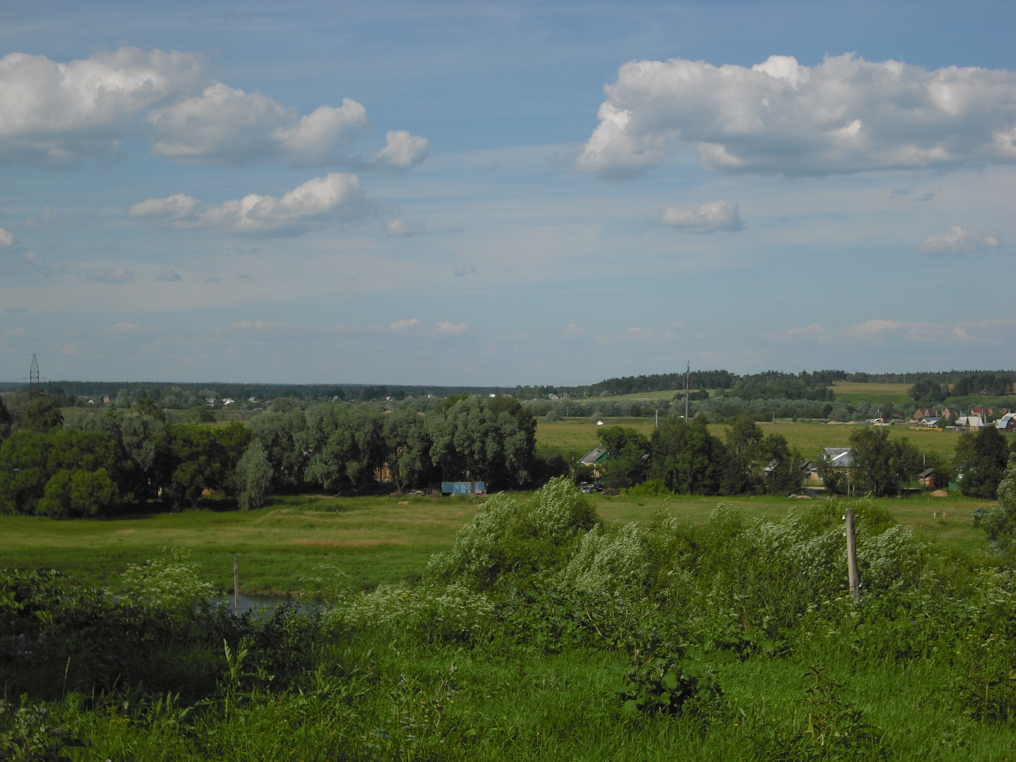 Северные окрестности Можайска